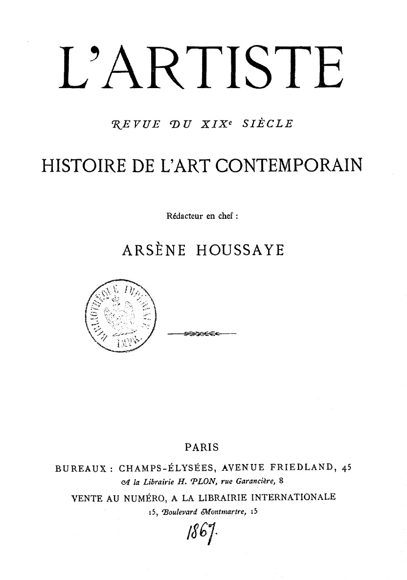 L'Artiste, couverture, 1867.